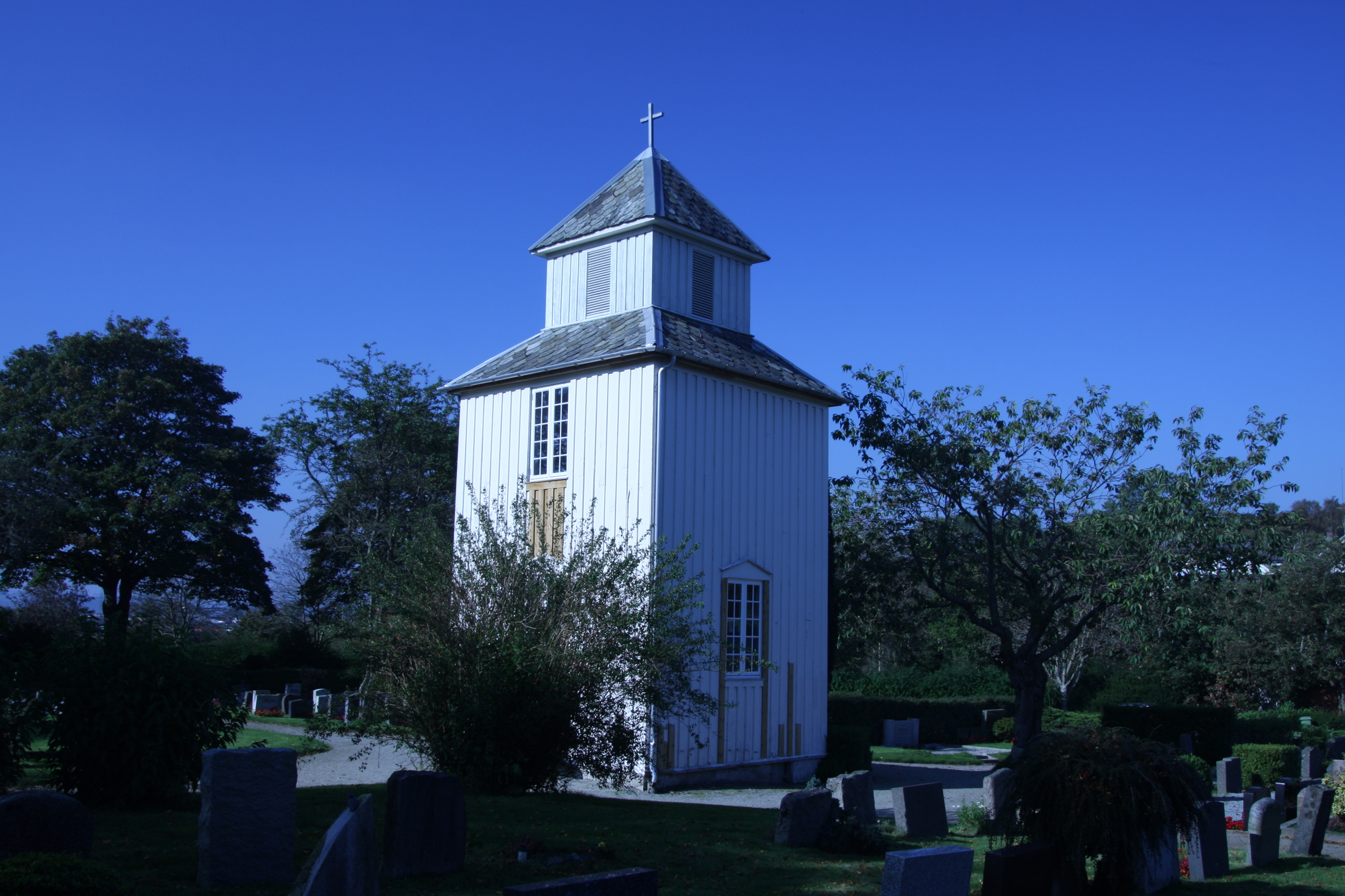 Klokketårnet på Hinna kirkegård